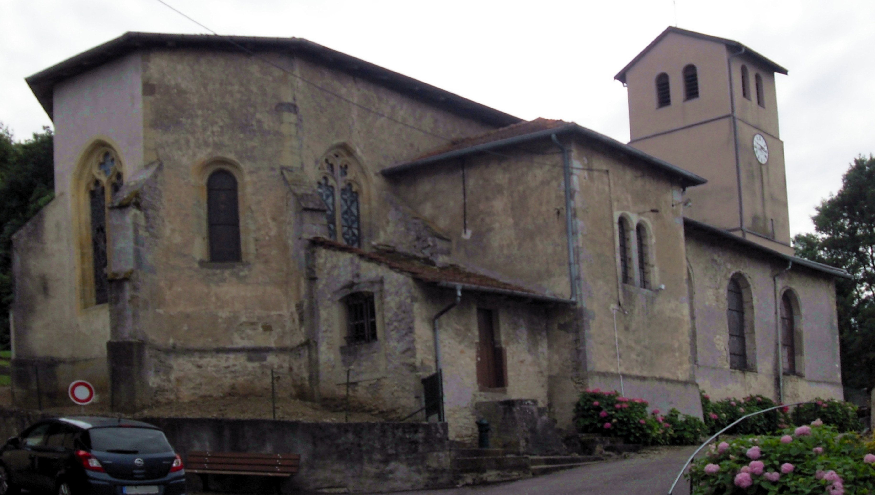 L'église Saint-Brice de Savigny